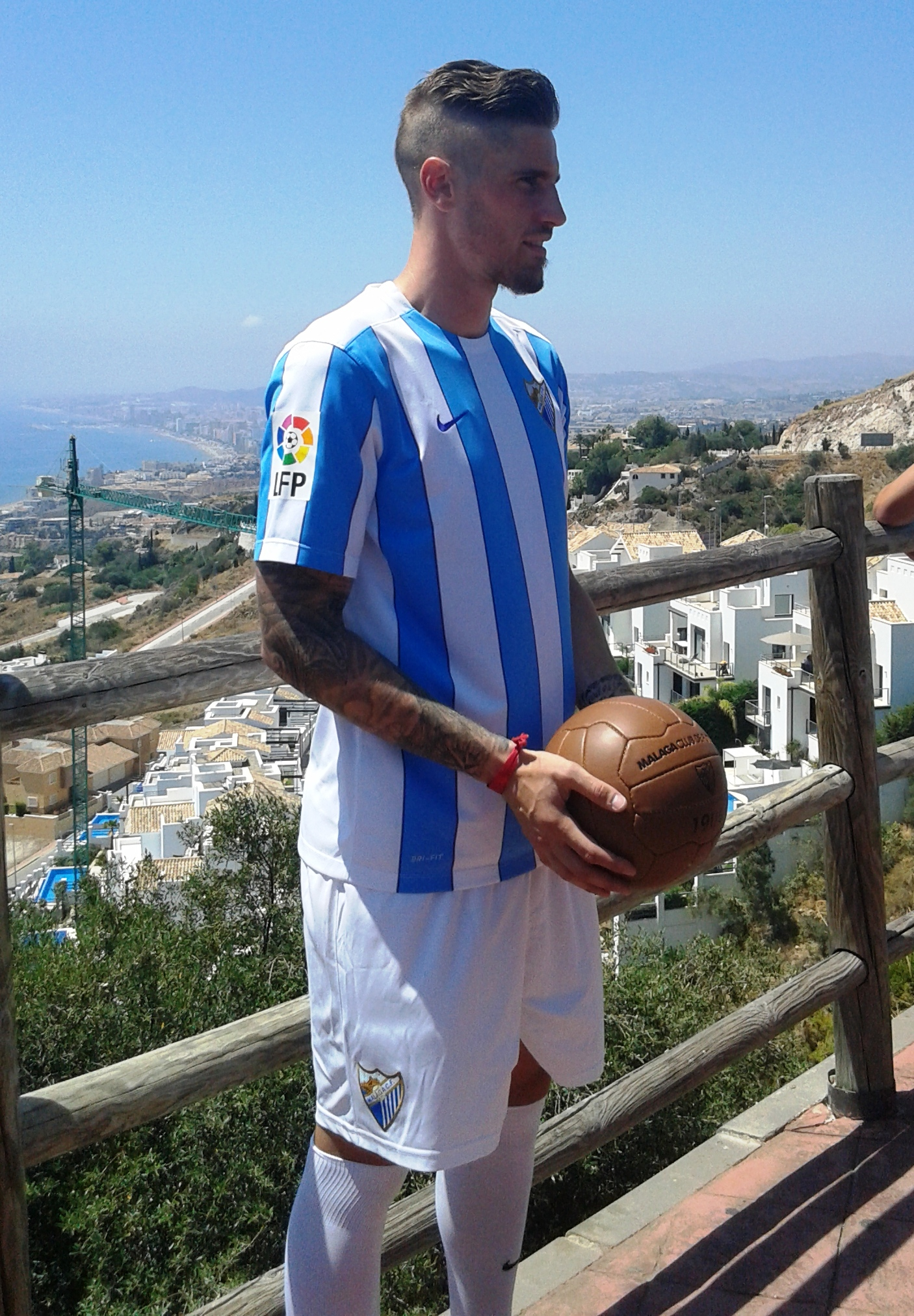 El futbolista valenciano del Málaga CF Raúl Albentosa durante su presentación oficial en Benalmádena, España